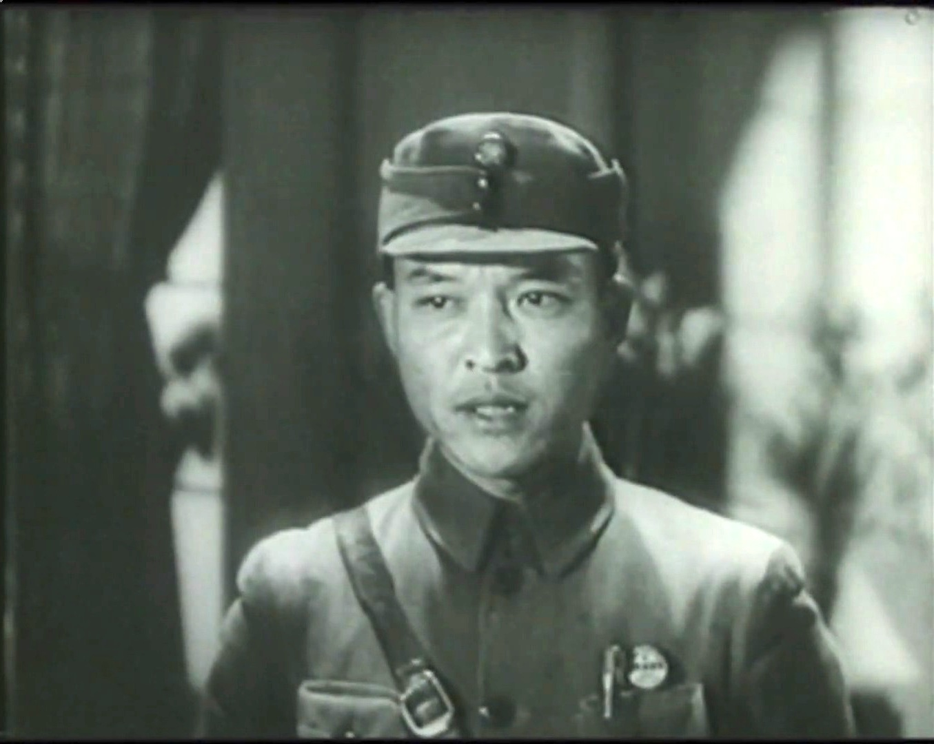 朝鮮義勇隊金元鳳